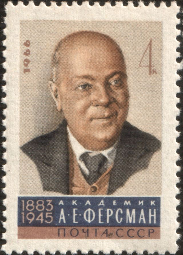 Alexander E. Fersman (1833–1945), minéralogiste russe